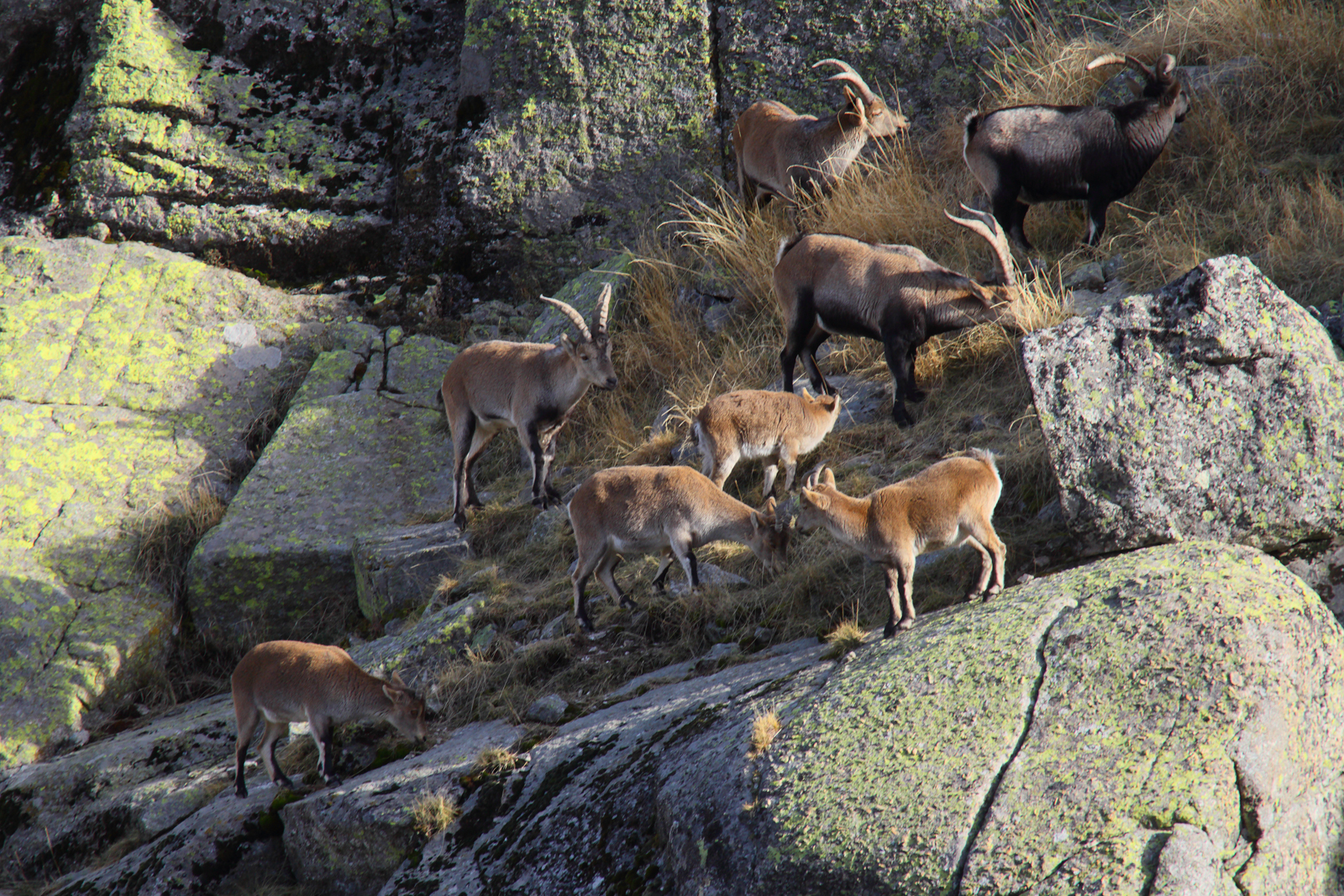 Cabra montés